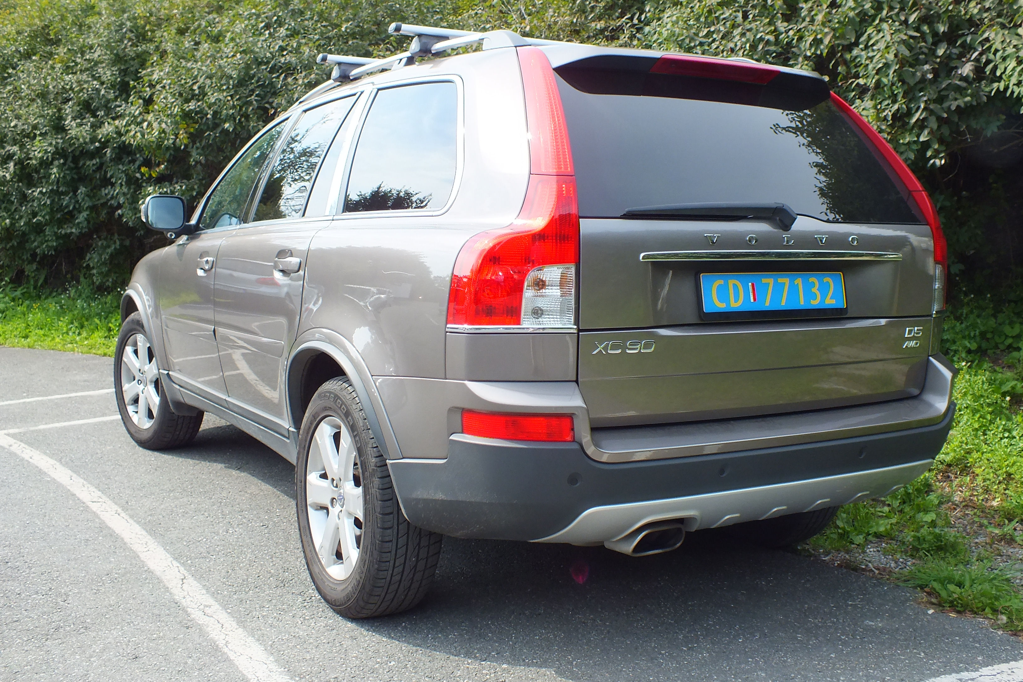 Diplomatbil tilhørende Tsjekkia